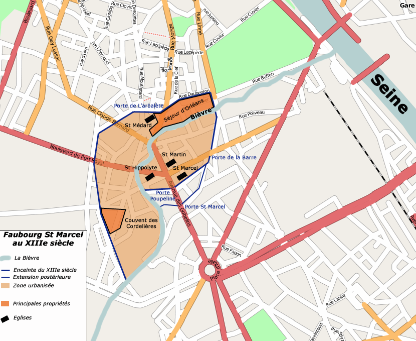 Carte de l'enceinte du faubourg Saint-Marcel au XIIIe siècle